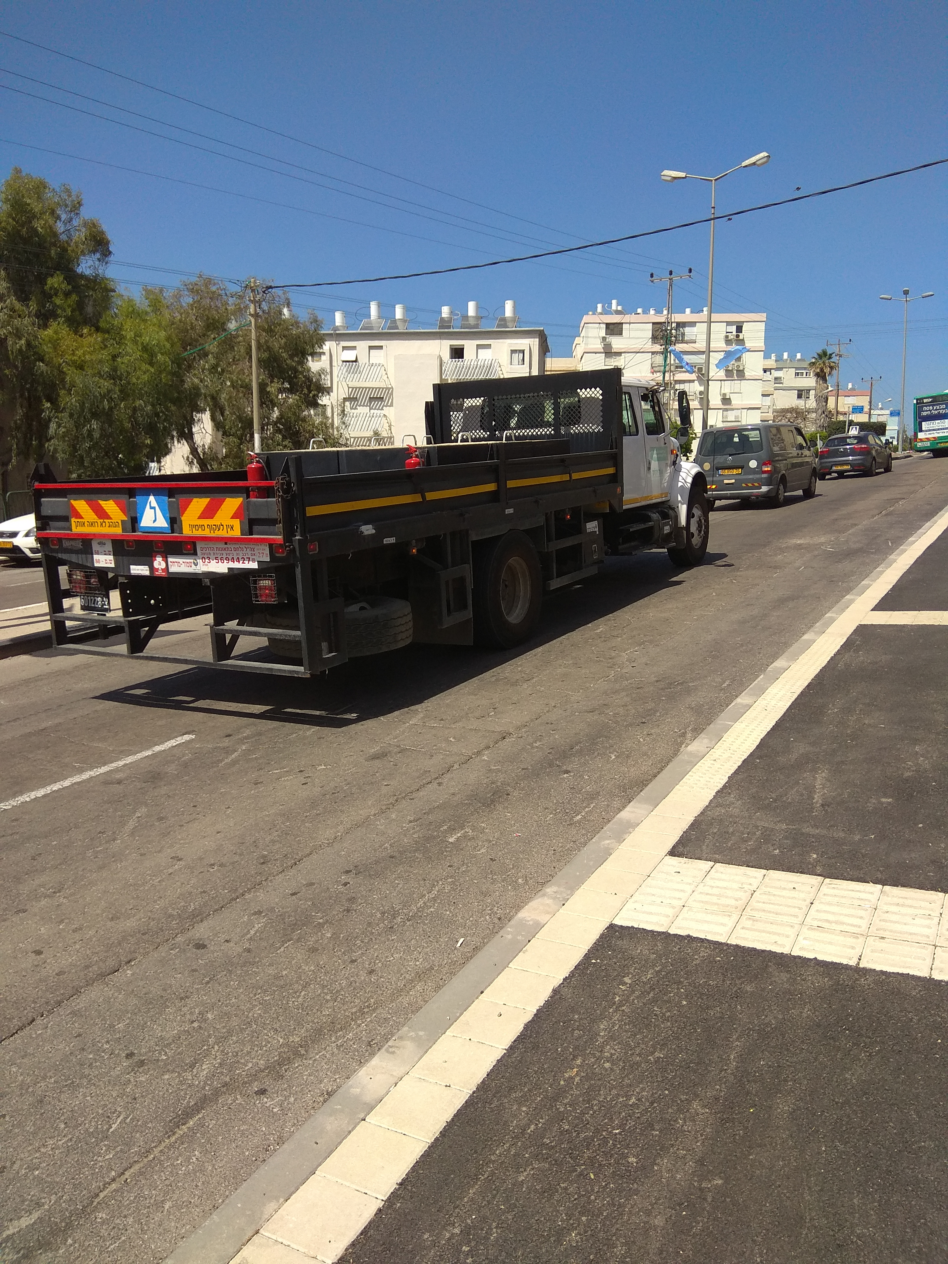 שיעור נהיגה על רכב כבד בצה"ל